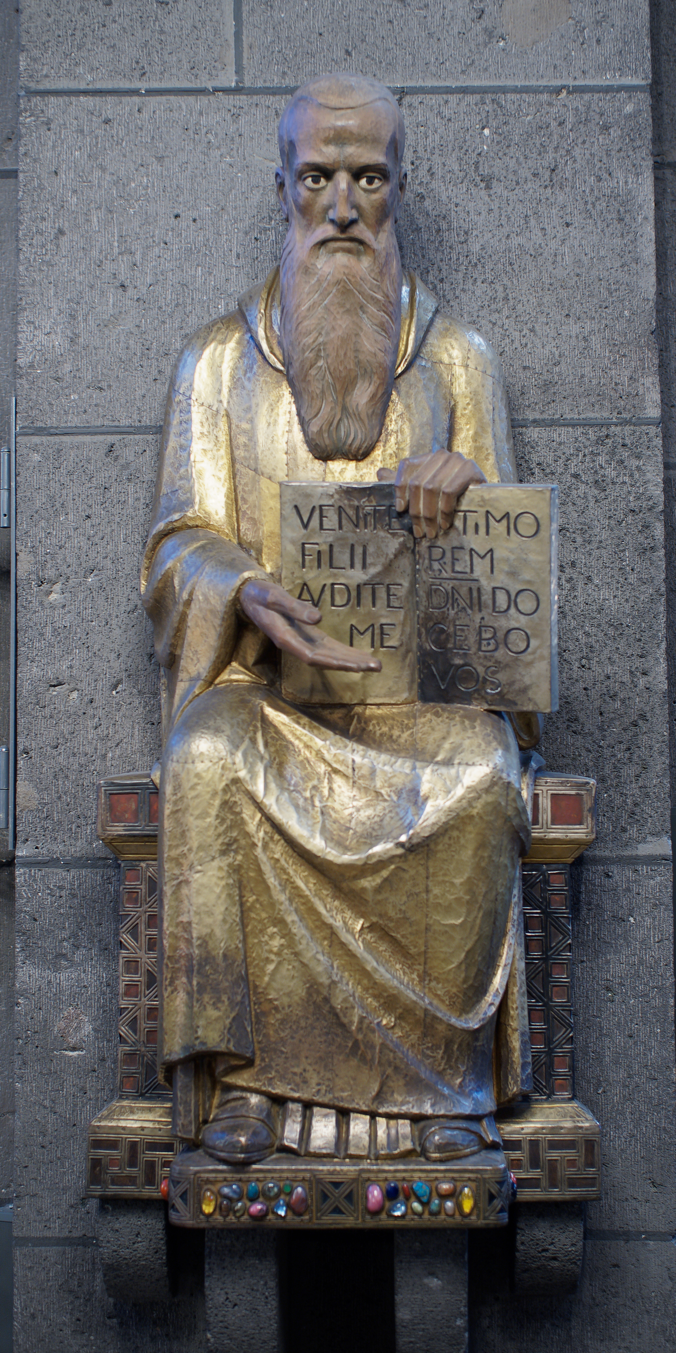 Statue Benedikt von Nursia darstellend, an einer Säule der Abteikirche Maria Laach. Glees (RP), Denkmalzone Maria Laach. Inschrift auf dem Buch: "Venite filii audite me. Timorem D[omi]ni docebo vos." (Regula Benedicti Prol. 12, gleichzeitig Zitat von Ps 34,12)